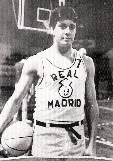 Carmelo Cabrera a su llegada al Real Madrid 1968